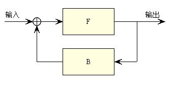 反馈的基本框图。 Alexcn绘制，放到公共领域。